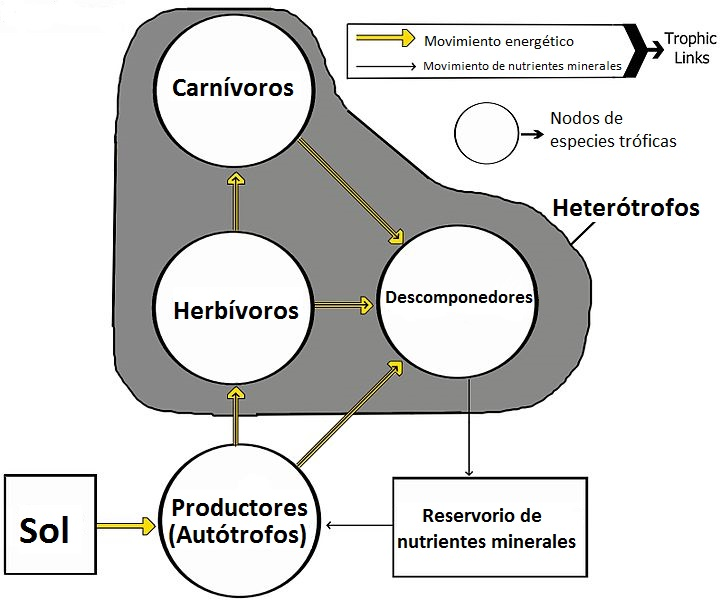 Modelo del movimiento de energía y nutrientes en una red alimenticia. Traducido de su versión del inglés.